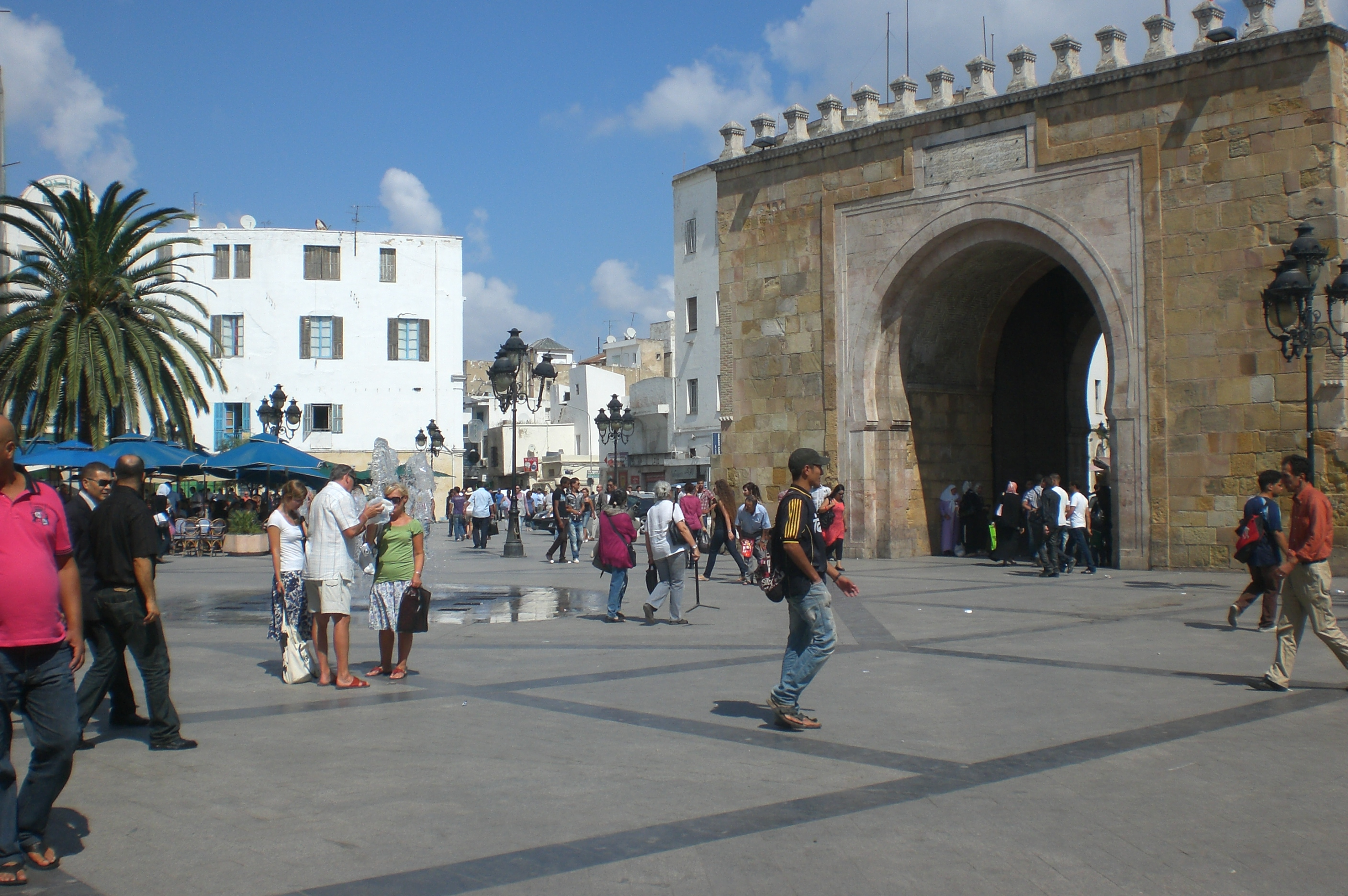 Place la victoire-Tunis